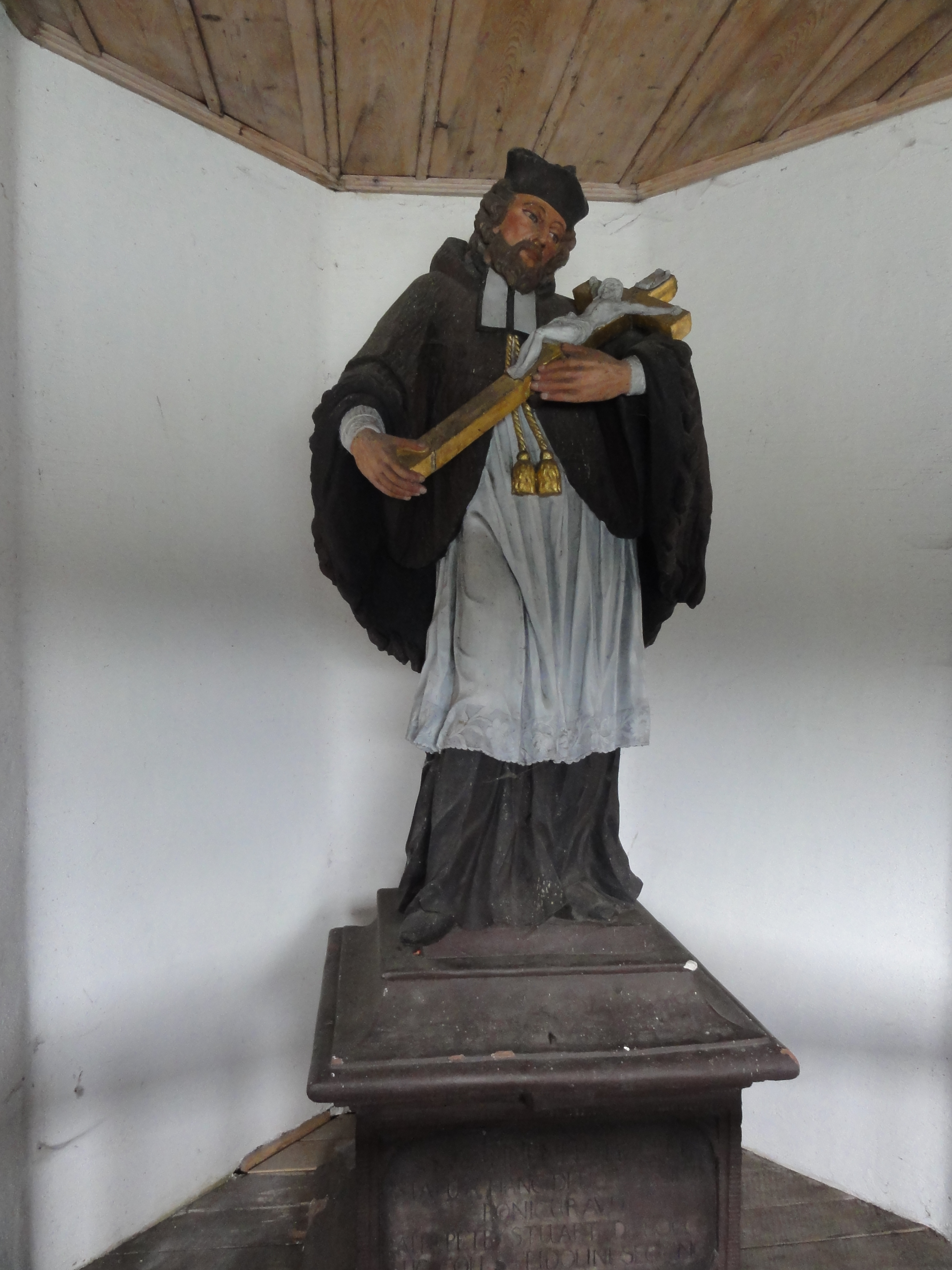 Stein AG, Holzbrücke über den Rhein - Heiliger Johannes Nepomuk, u.a. Schutzpatron von Brücken, 1712. Auf deutscher Seite findet sich eine gleich große Holzfigur des Hl. Franz Xaver (geschaffen um 1700) Info GPS data may be inaccurate. EXIF data regarding date and time may be inaccurate.